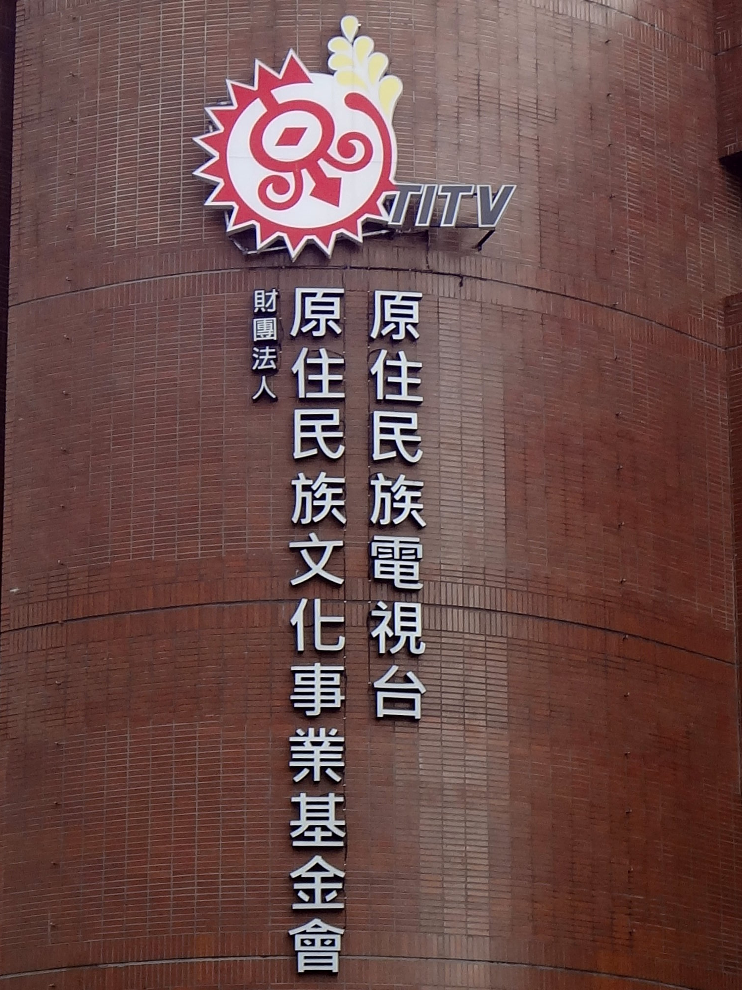 中國電視大廈外牆懸掛的原住民族文化事業基金會與原住民族電視台標誌。